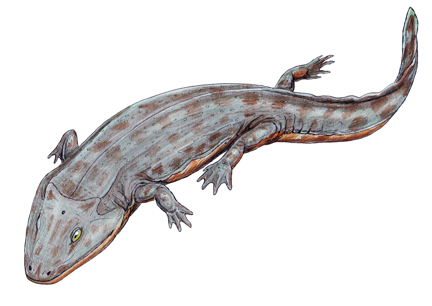 Iberospondylus schultzei